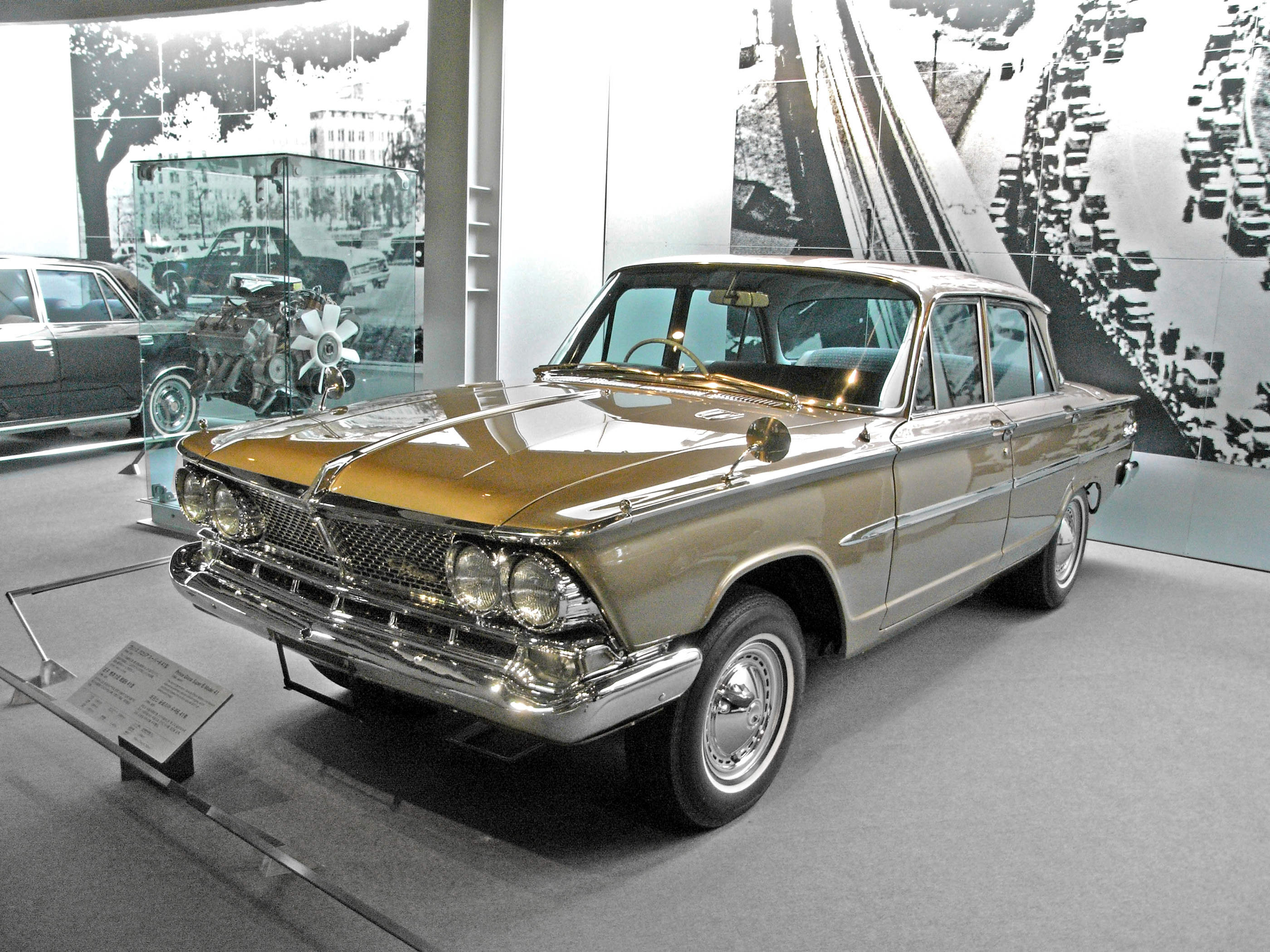 Prince gloria super6 41 (1966)